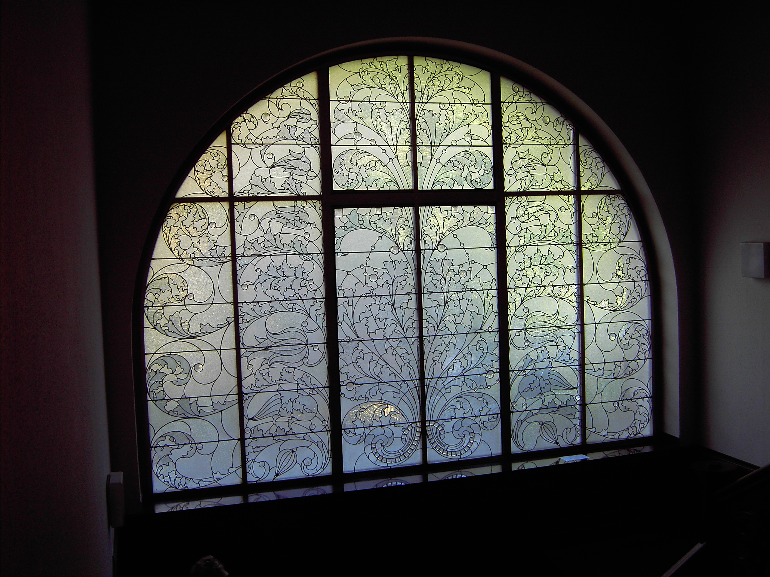 Fensterfront in der Villa Lynen, Stolberg